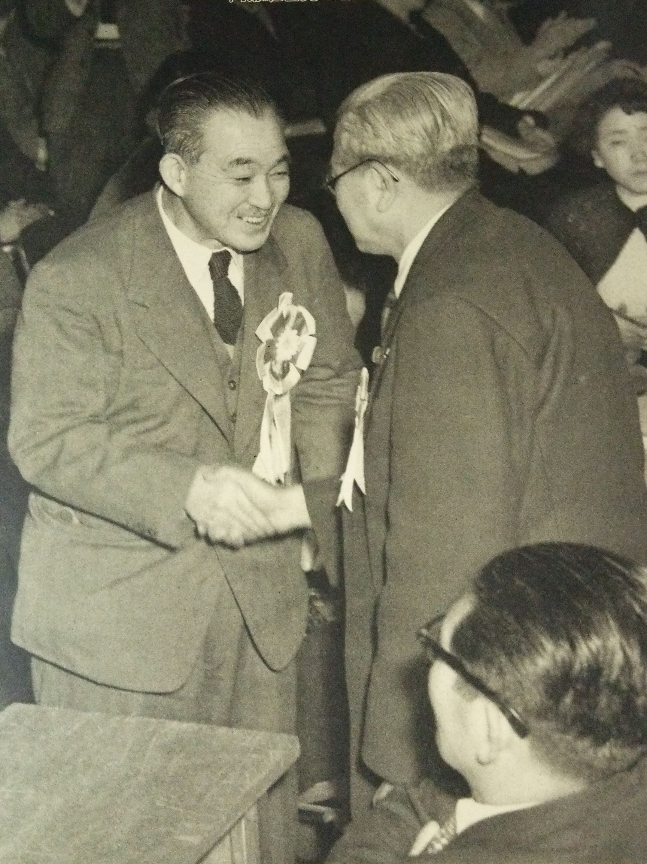 社会党統一決議を採択した1955年1月18日の右派社会党党大会において、握手を交わす鈴木茂三郎（左）と河上丈太郎（右）